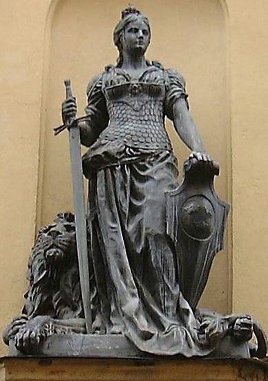 Stuatue der Mutter Svea